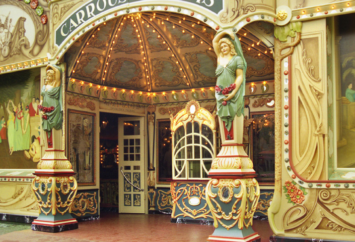 Efteling Carrousel Paleis